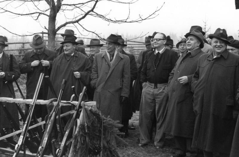 Januar 1956 Diplomaten-Jagd im Hunsrück auf Einladung von Außenminister Heinrich von Brentano